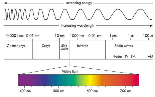 Espektro elektromagnetikoa